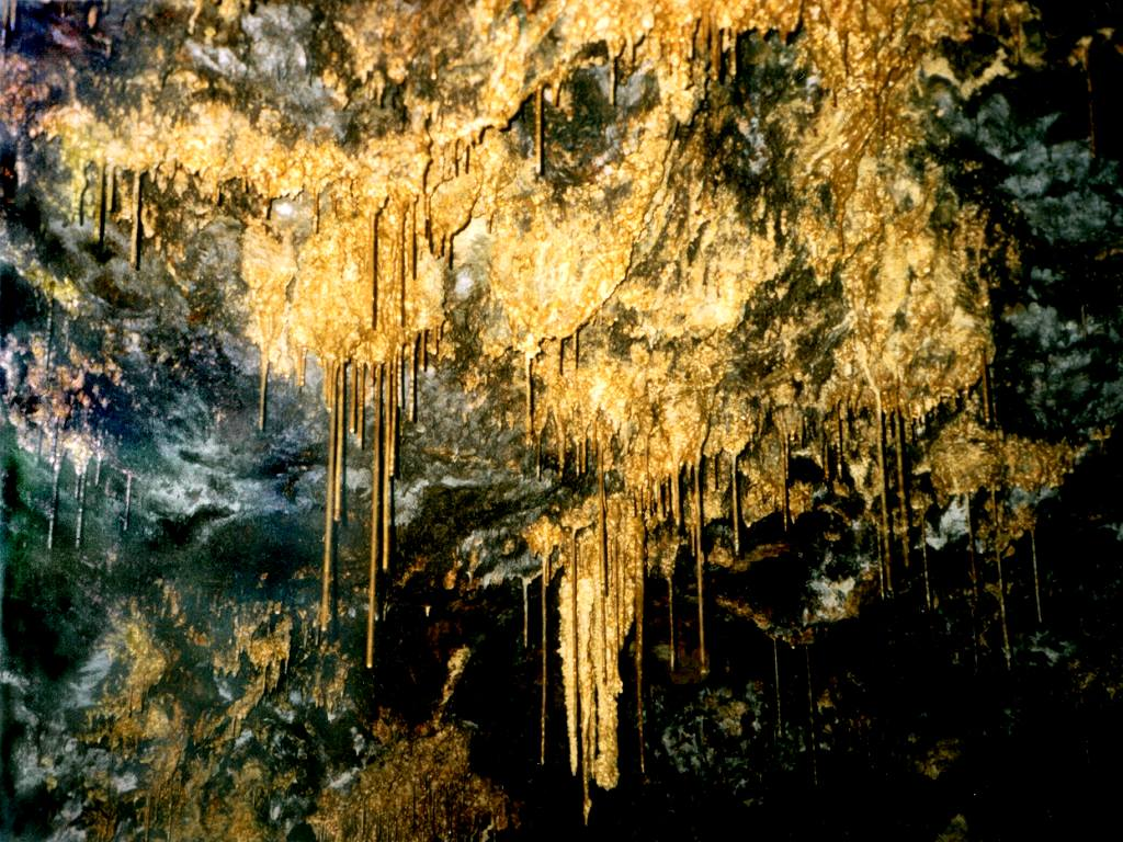 Diadochit-Stalaktiten (hängende Tropfsteine) von bis zu 40 cm Länge in der Tropfsteingrotte des Besucherbergwerkes Alaunwerk Mühlwand bei Reichenbach (Vogtland/Sachsen). Foto: Lutz Eckner, 1995